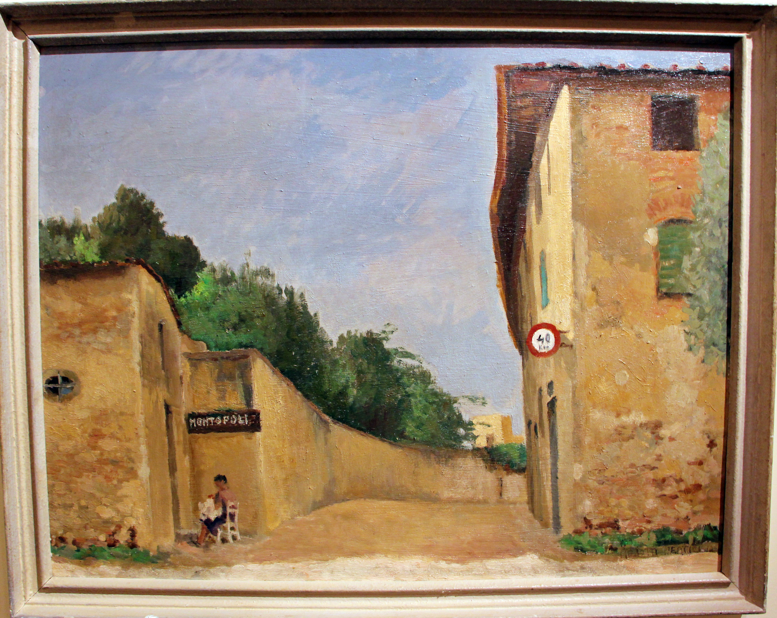 Ex Asilo M. e L. Guicciardini (sede museo e uff. tecnico) The making of this document was supported by Wikimedia CH. (Submit your project!) For all the files concerned, please see the category Supported by Wikimedia CH. This is a photo of a monument which is part of cultural heritage of Italy.